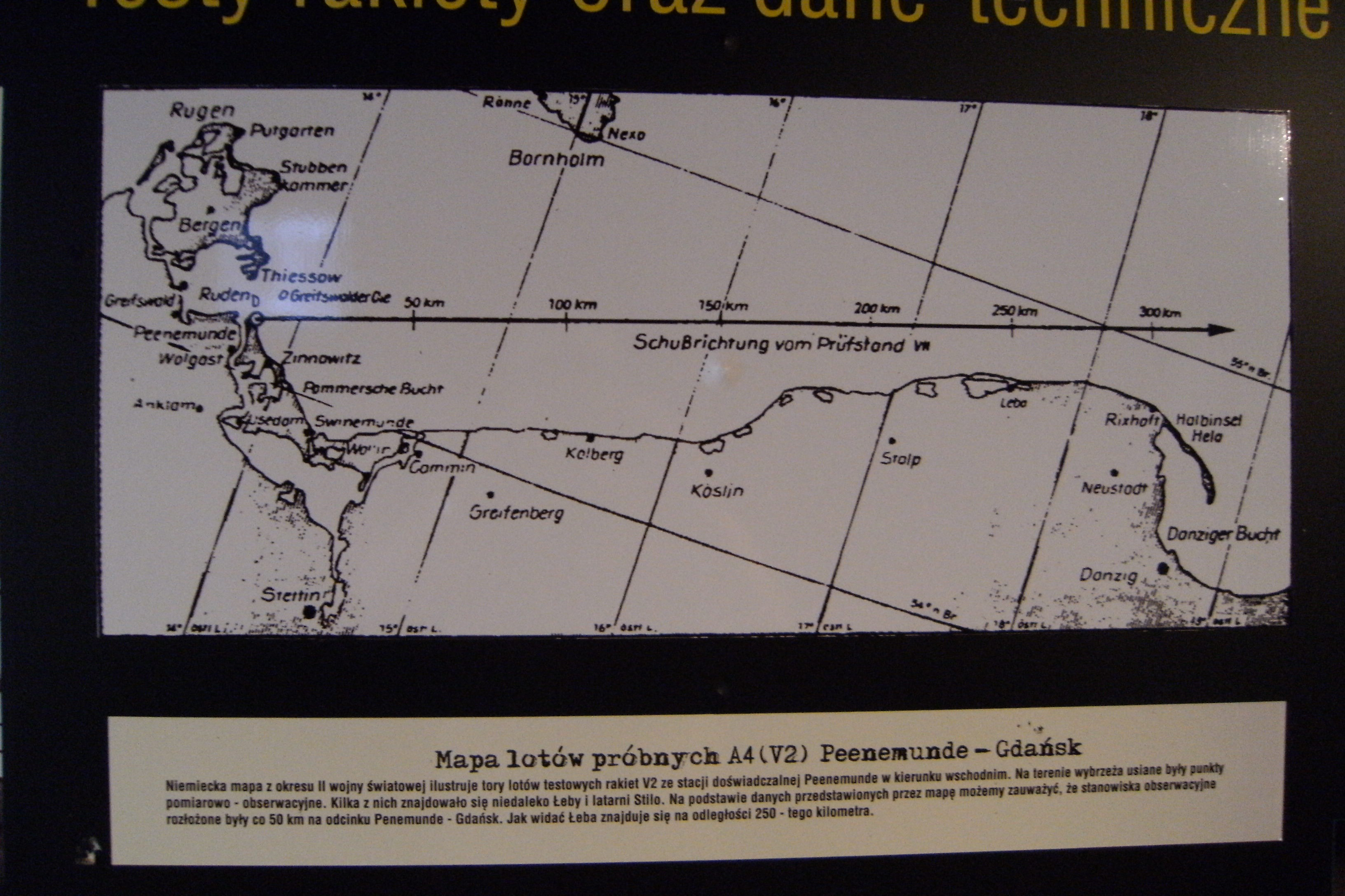 Meßstelle Rumbke für V2/A4 von Peenemünde